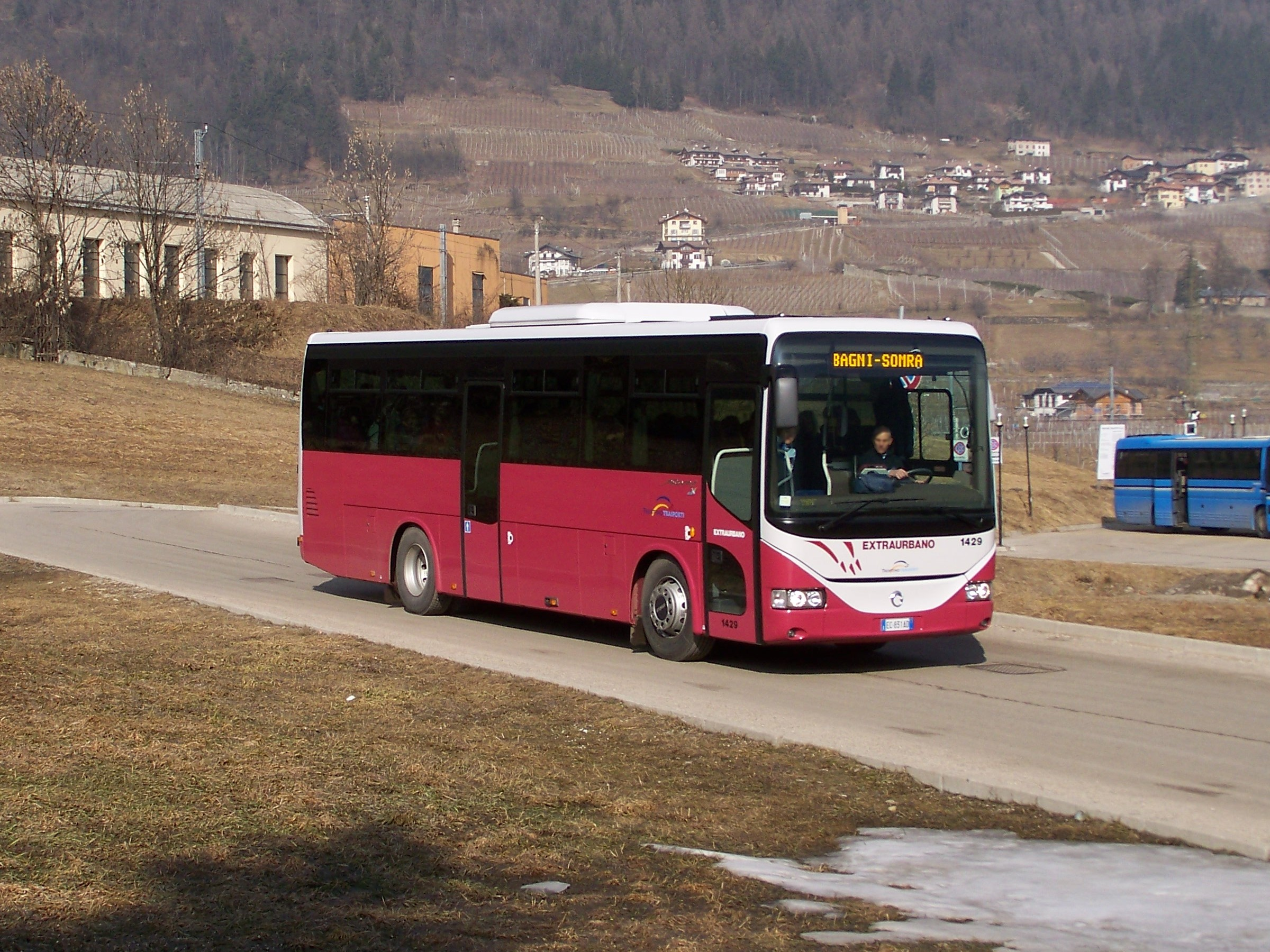 L'Iribus Arway nr. 1429 della Trentino Trasporti in uscita dal piazzale antistante la nuova stazione di Malè.